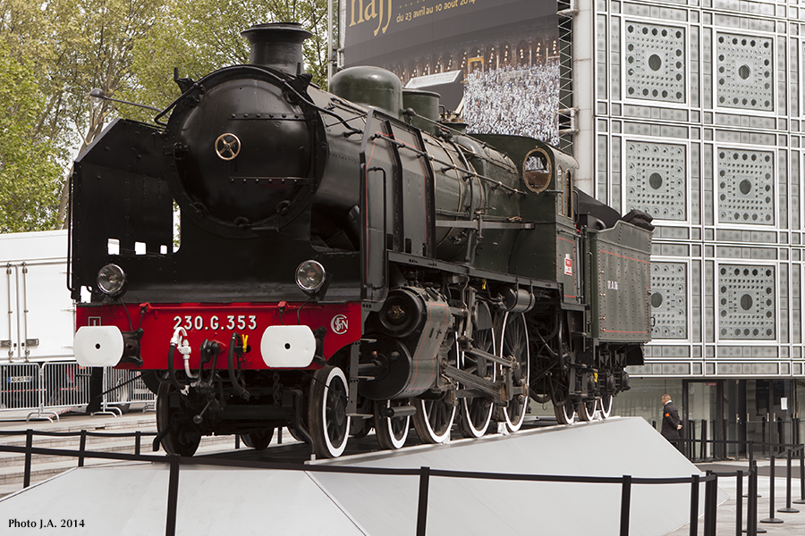 Exposition Paris Institut du Monde Arabe Avril 2014